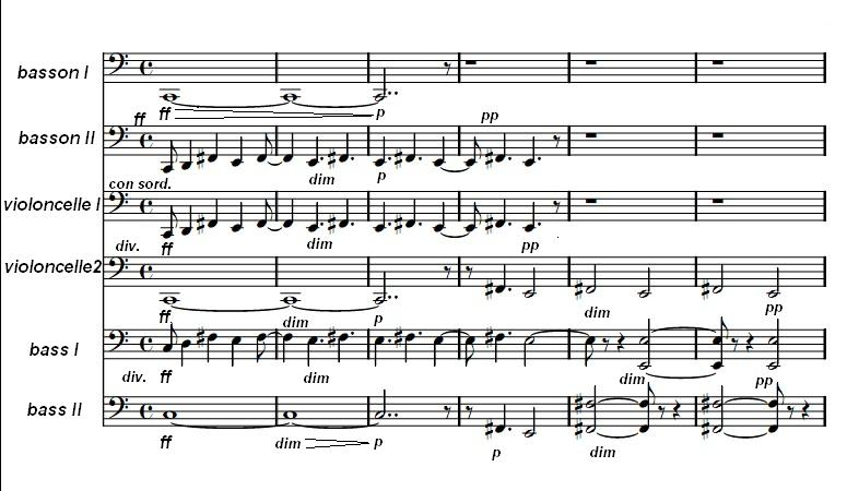 Début de la 4° symphonie de Jean Sibelius